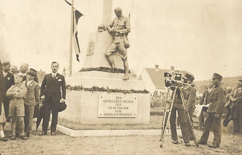 Enthüllung Denkmal für die Infanterieregimenter 83 und 106 in Pinkafeld am 1. Juli 1934